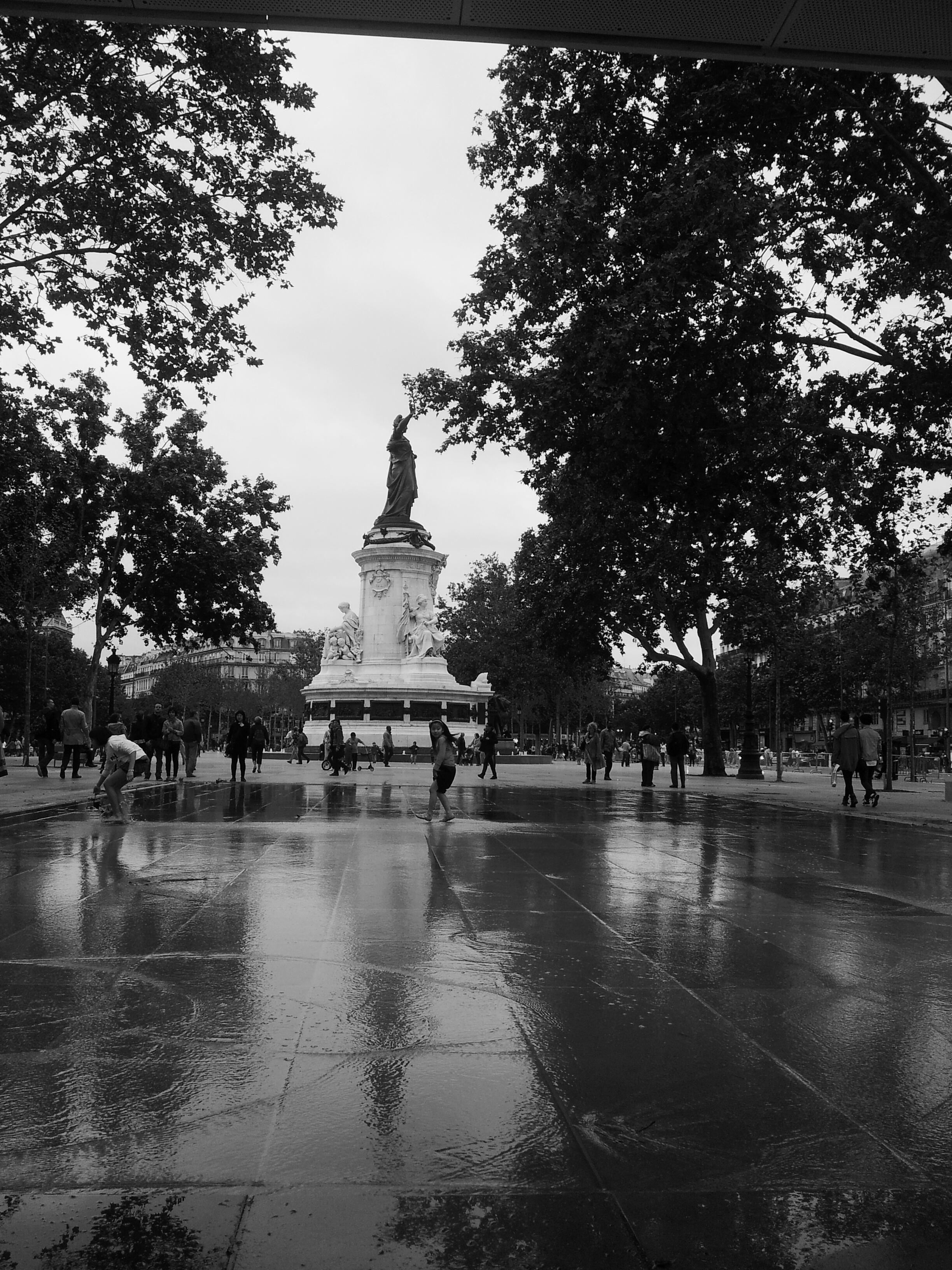 miroir d'eau et la Marianne sur la nouvelle place de la République